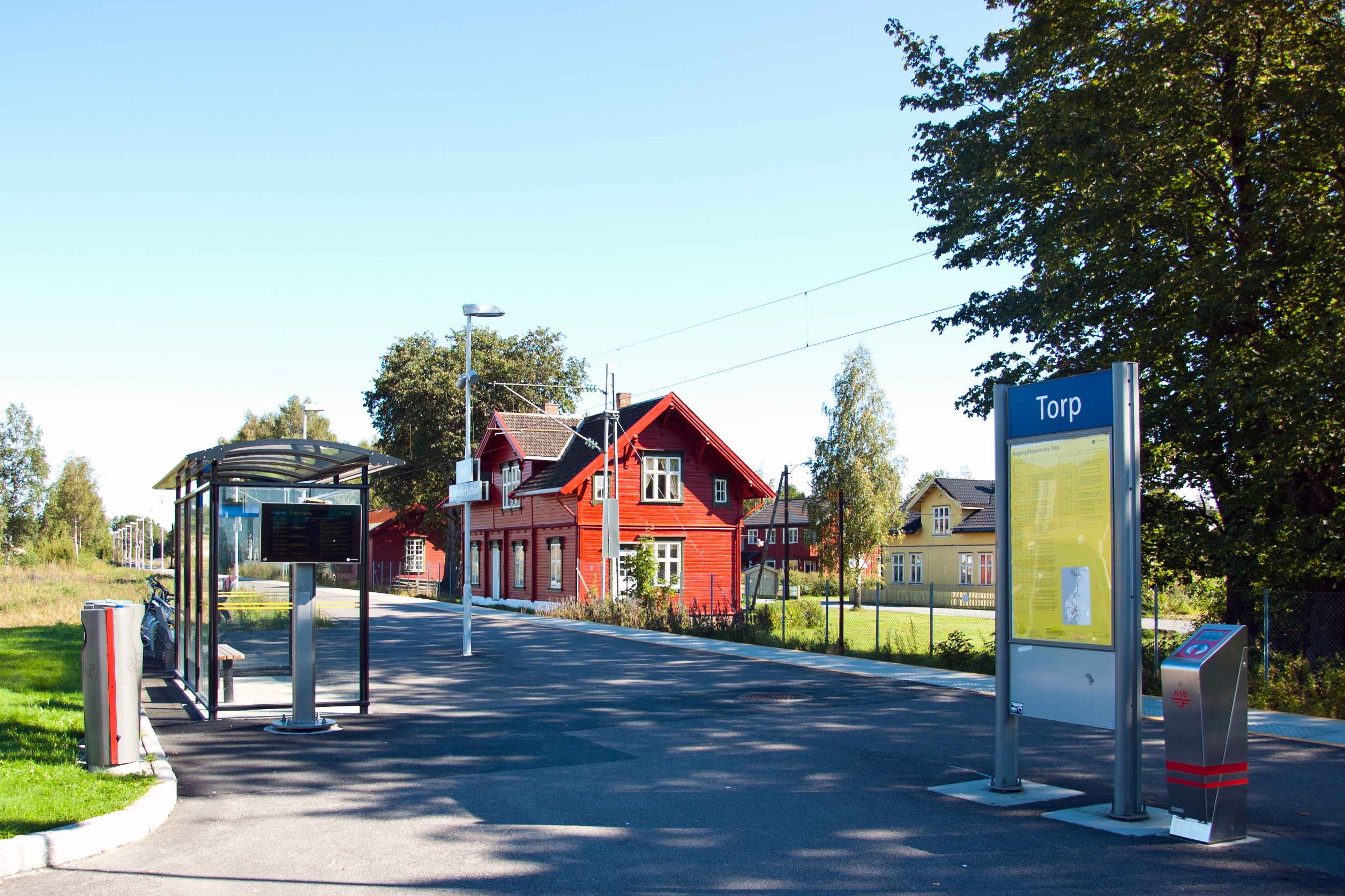 Torp stasjon på Vestfoldbanen